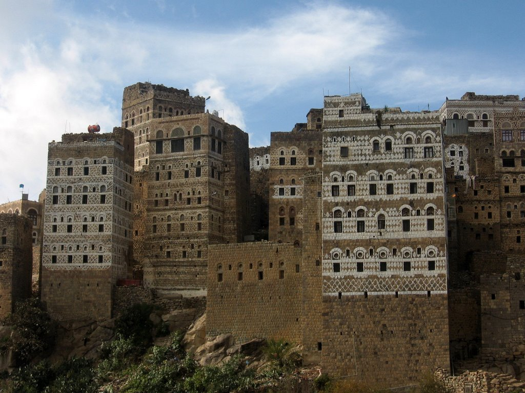 Al Hajjara